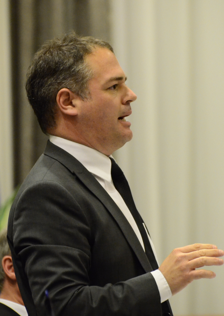 Jonatan Julien lors de la séance du conseil municipal de la ville de Québec